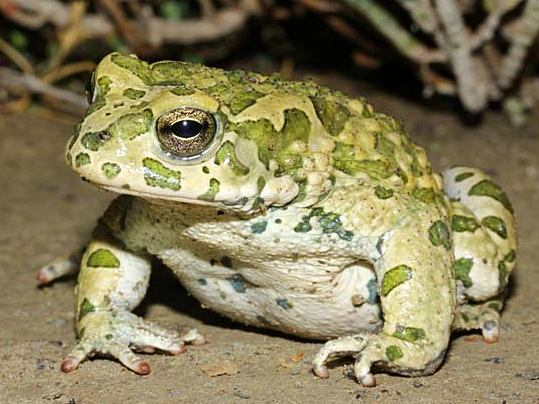 Bufotes oblongus